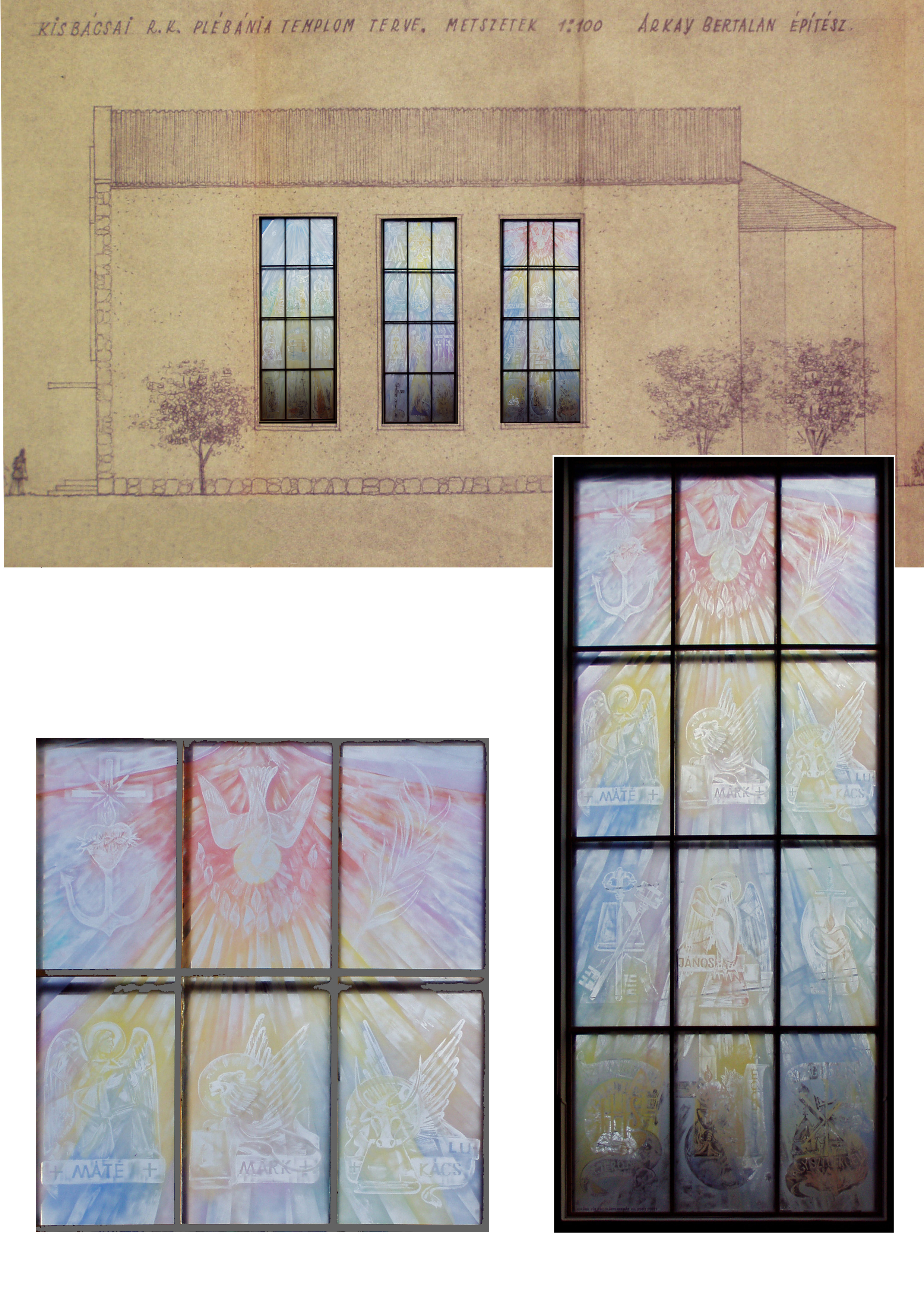 A kisbácsai római katolikus templom új üvegablakai, 2000